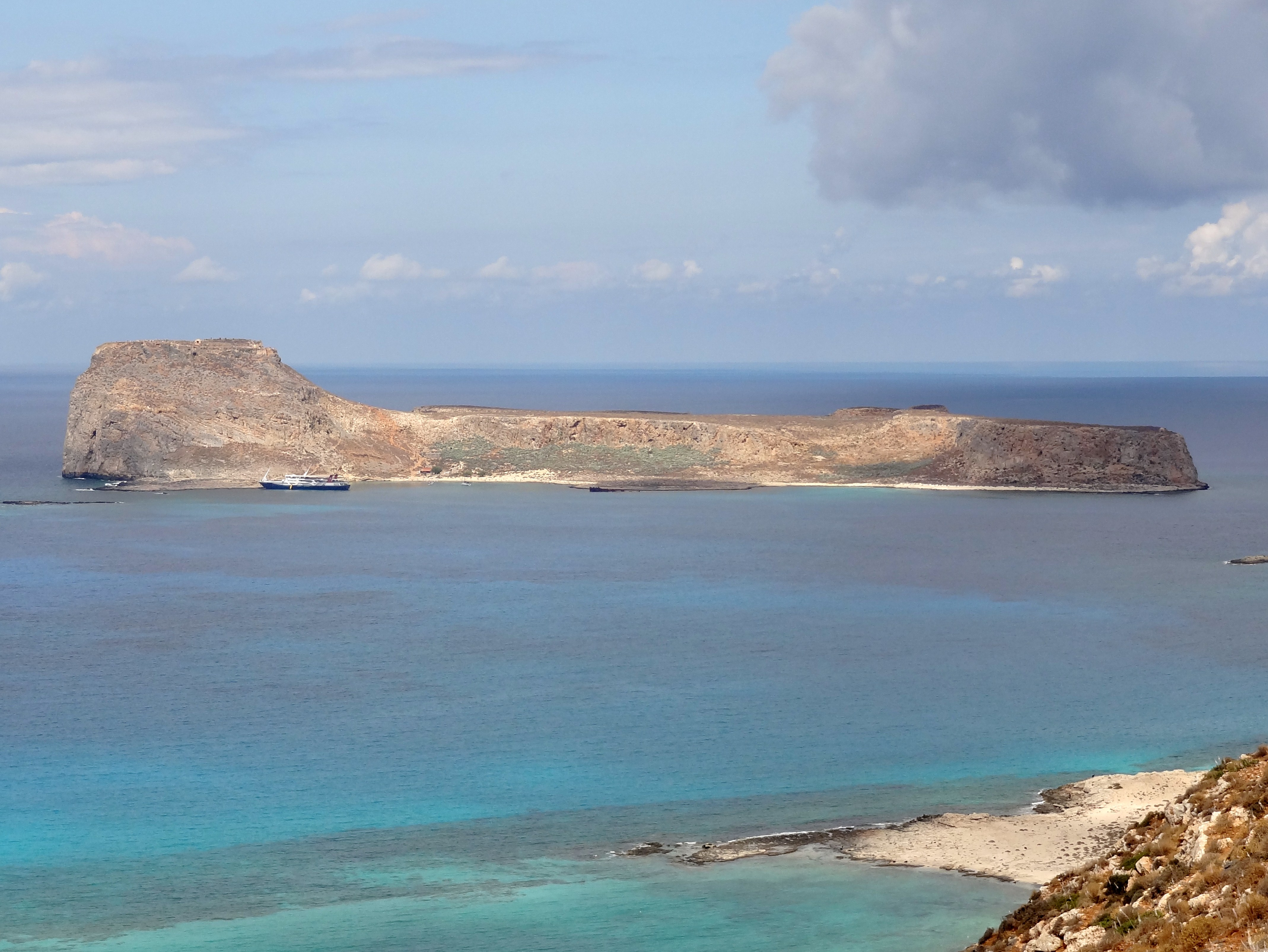 Imeri Gramvousa (Ήμερη Γραμβούσα), Gemeinde Kissamos, Regionalbezirk Chania, Kreta, Griechenland